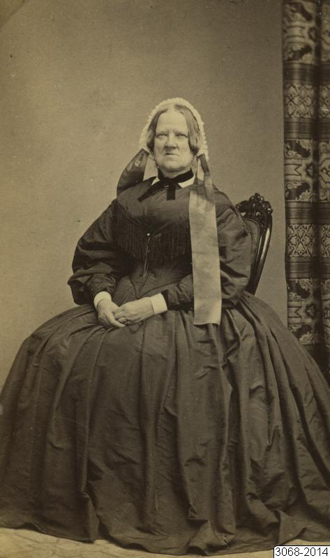 Helsingborgsfilantropen Nelly Krook